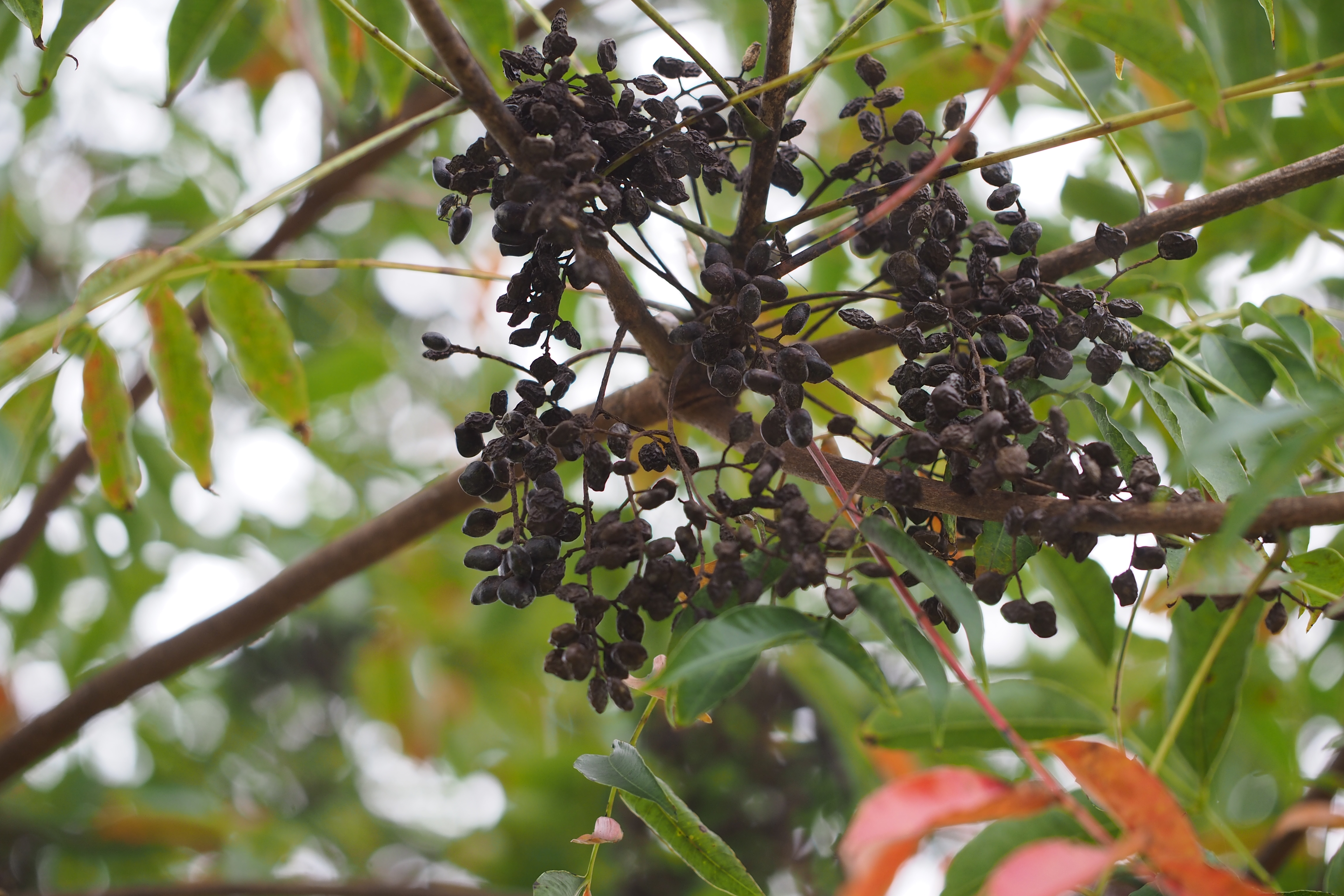 ハゼノキ.